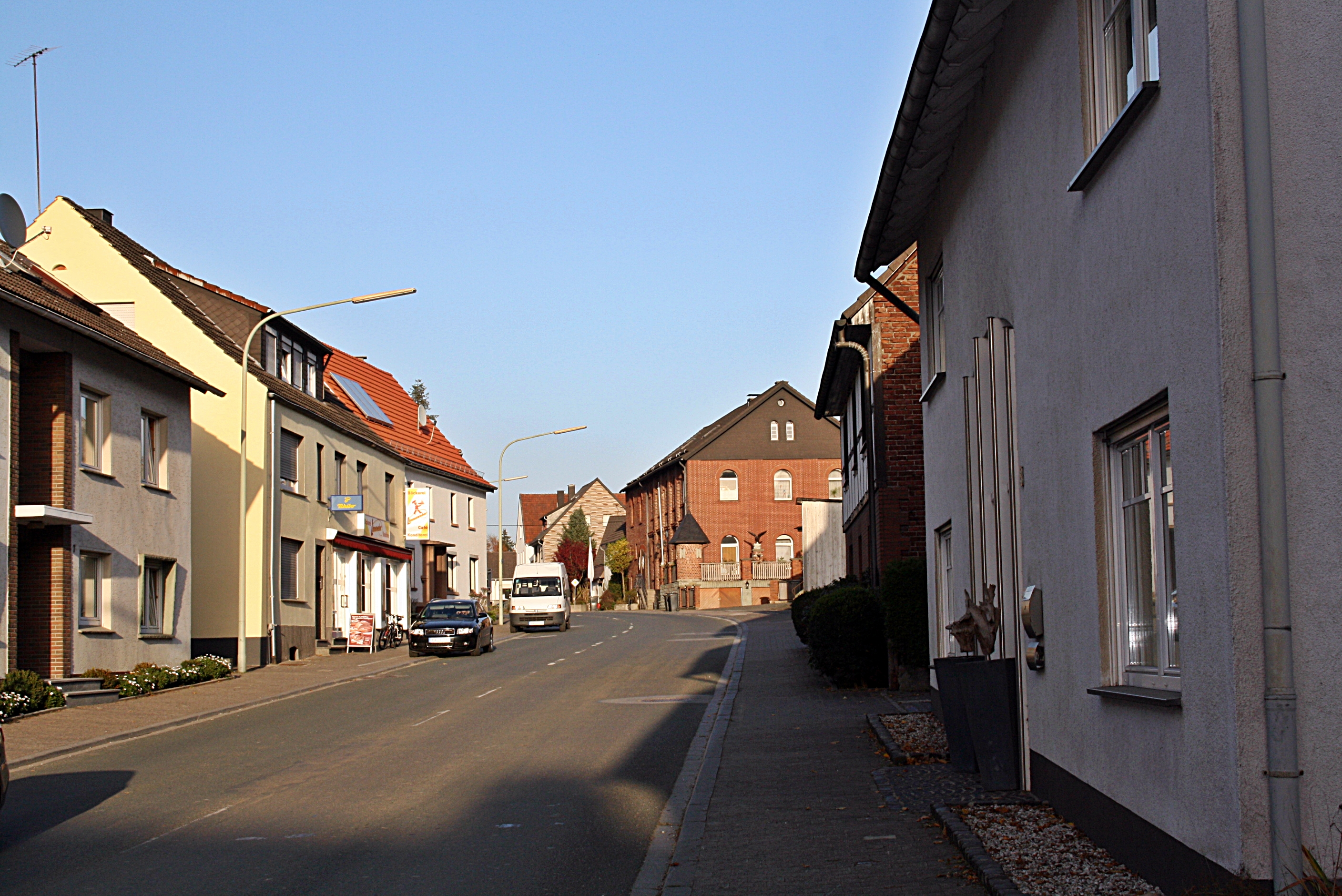 Brilon, Alme, Ortsansicht, Bundesstraße